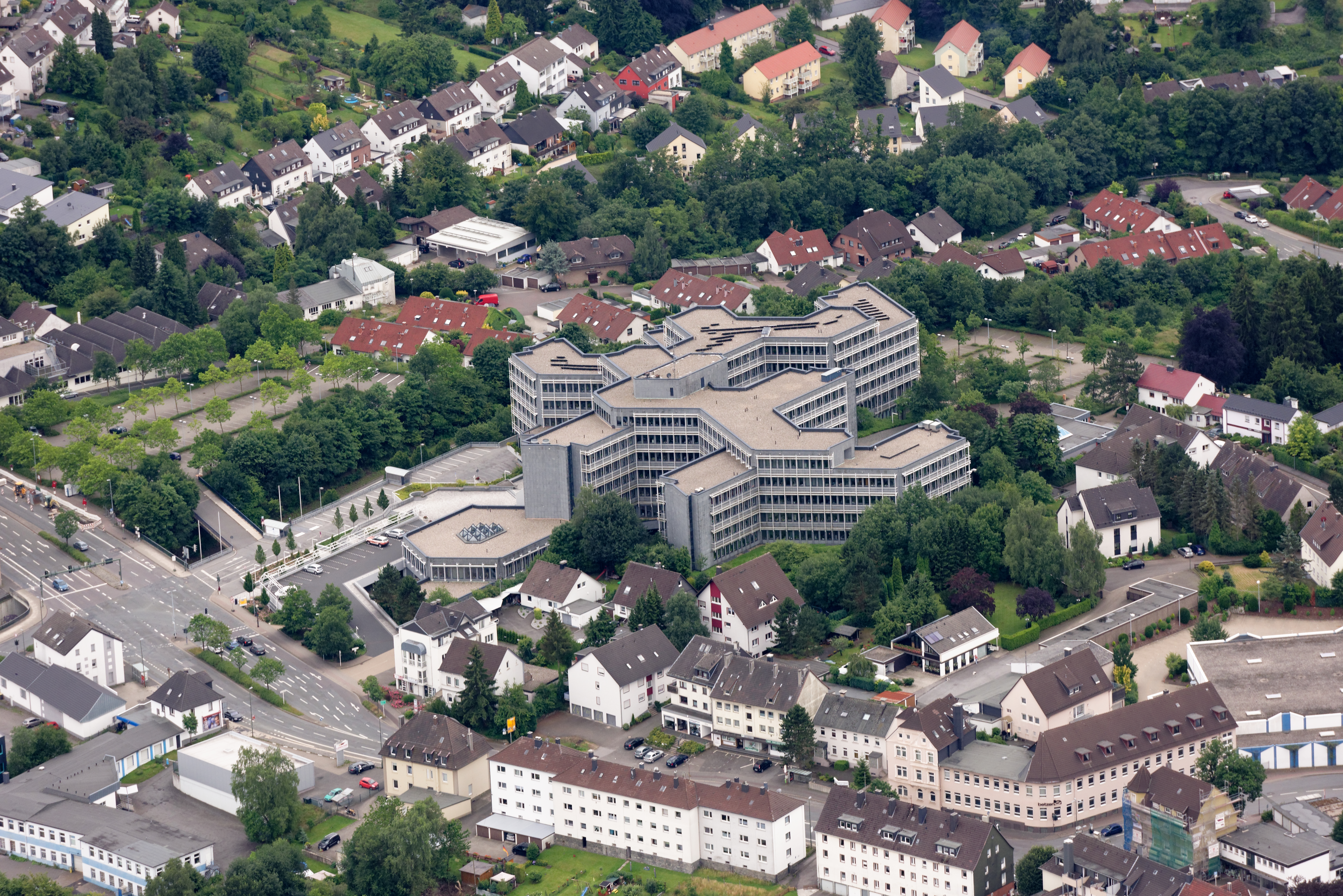 Luftaufnahme: Kreisverwaltung des Märkischen Kreises im Lüdenscheider Ortsteil Grünewald; Landesstraße 561, Nordrhein-Westfalen